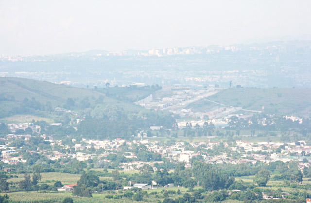 Comunidad de Bárcena, Villa Nueva. Al fondo, la ciudad capital de Guatemala